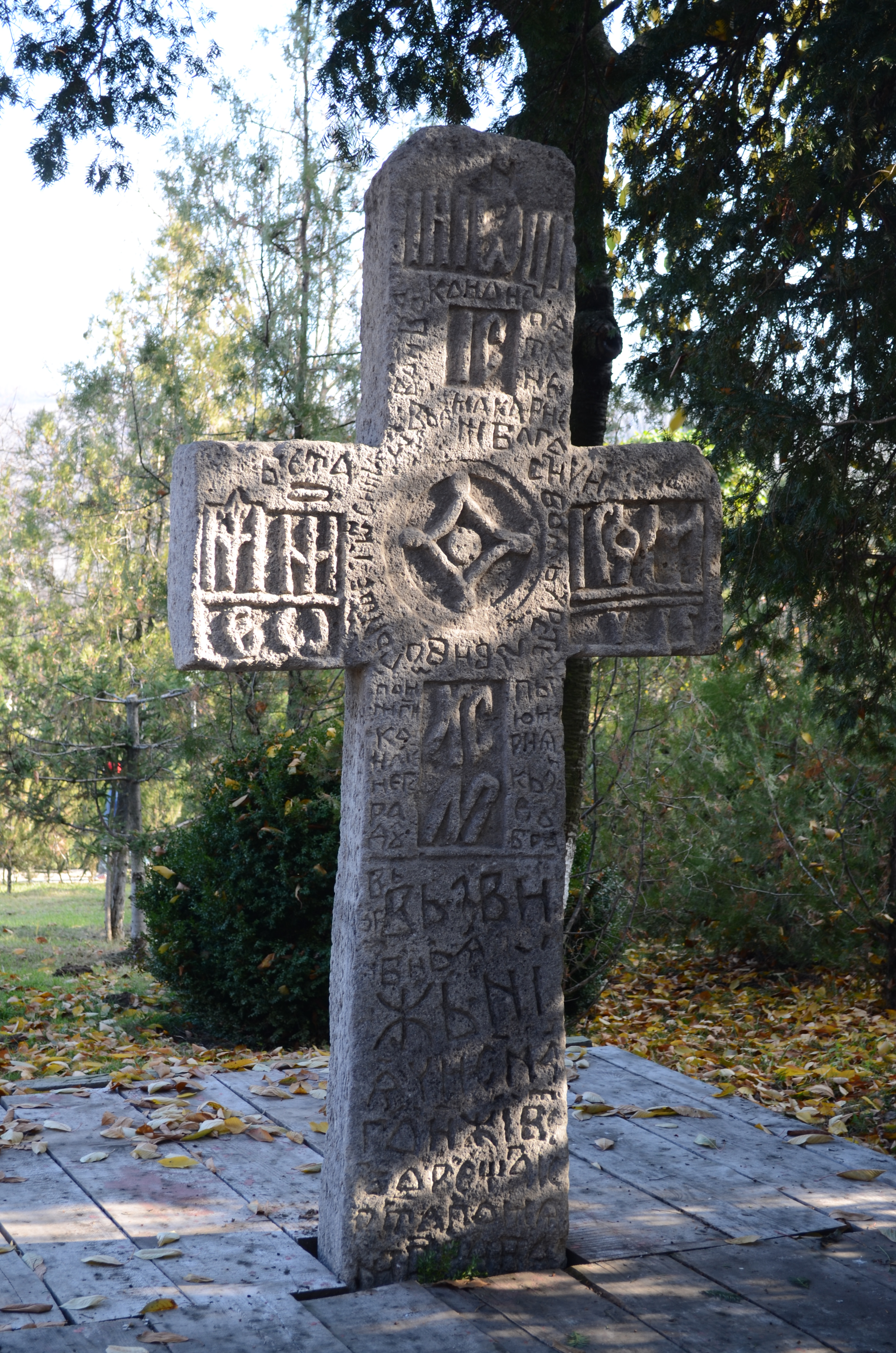 Cruce de pomenire de piatră, Mănăstirea Jercălăi, Prahova